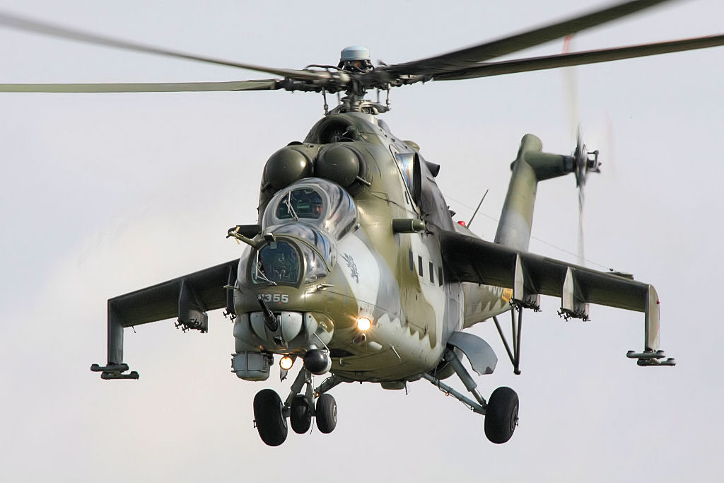 Mil Mi 24 Hind - RIAT 2008